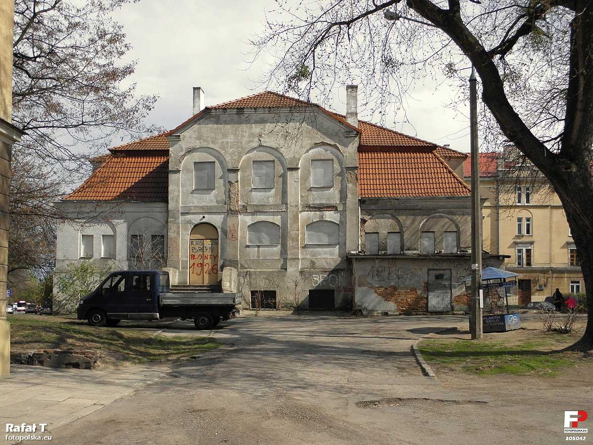 Budynek dawnej łaźni miejskiej.